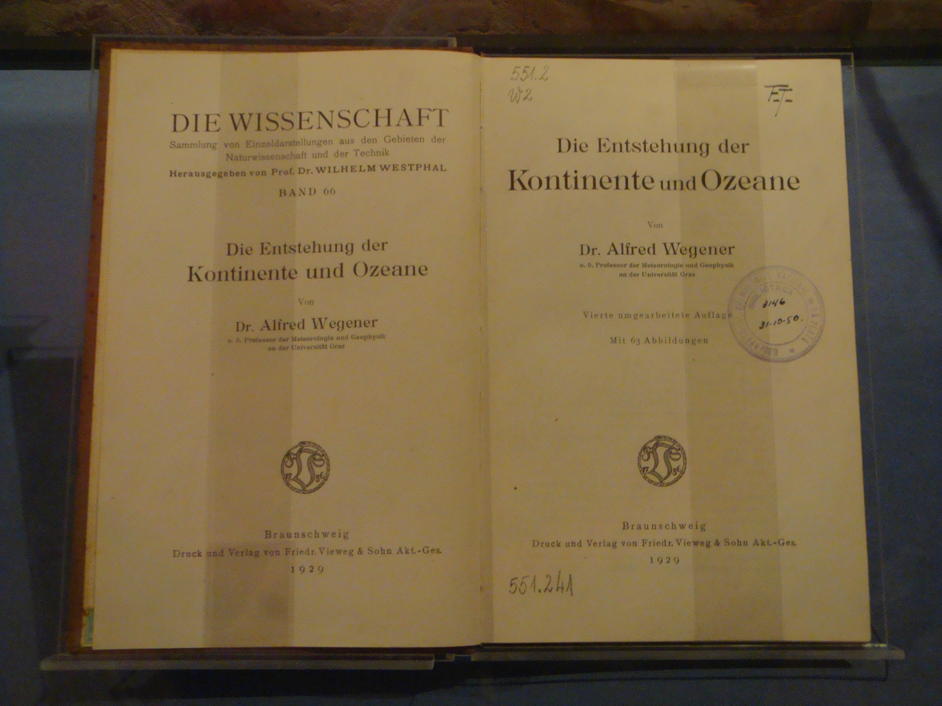 Ejemplar de "El origen de los continentes y océanos" de Alfred Wegener, exhibido en el Museo de Astronomía y Geofísica de La Plata. Edición de 1929.